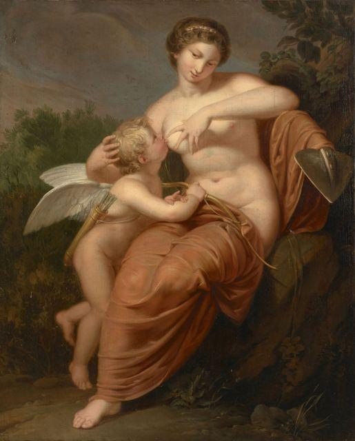 Vénus et l'Amour